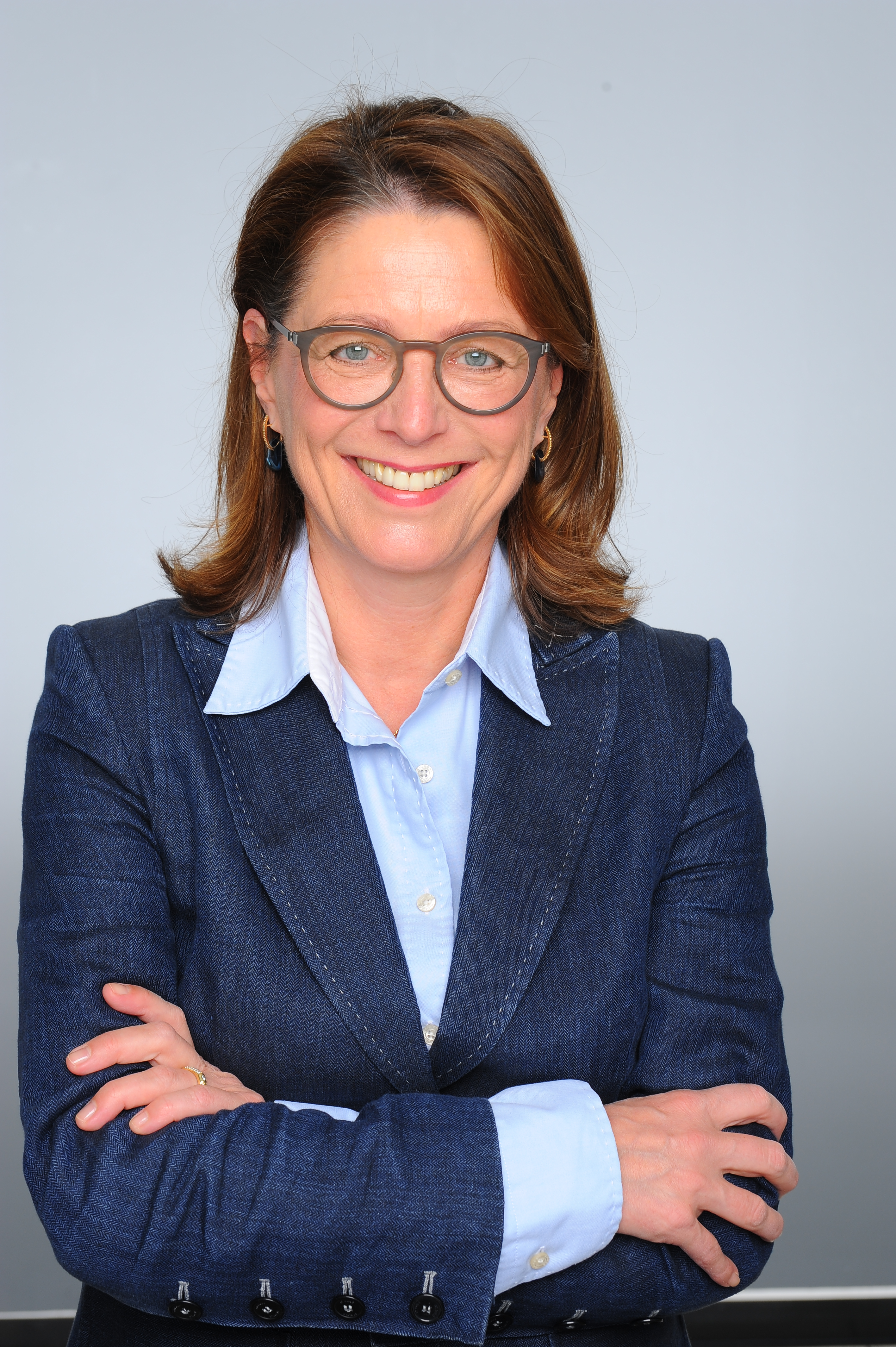 Prof. Dr. Rita Schmutzler